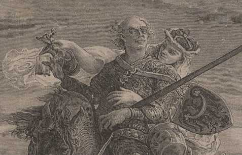 Zofia z Doren i Bolesław Rogatka